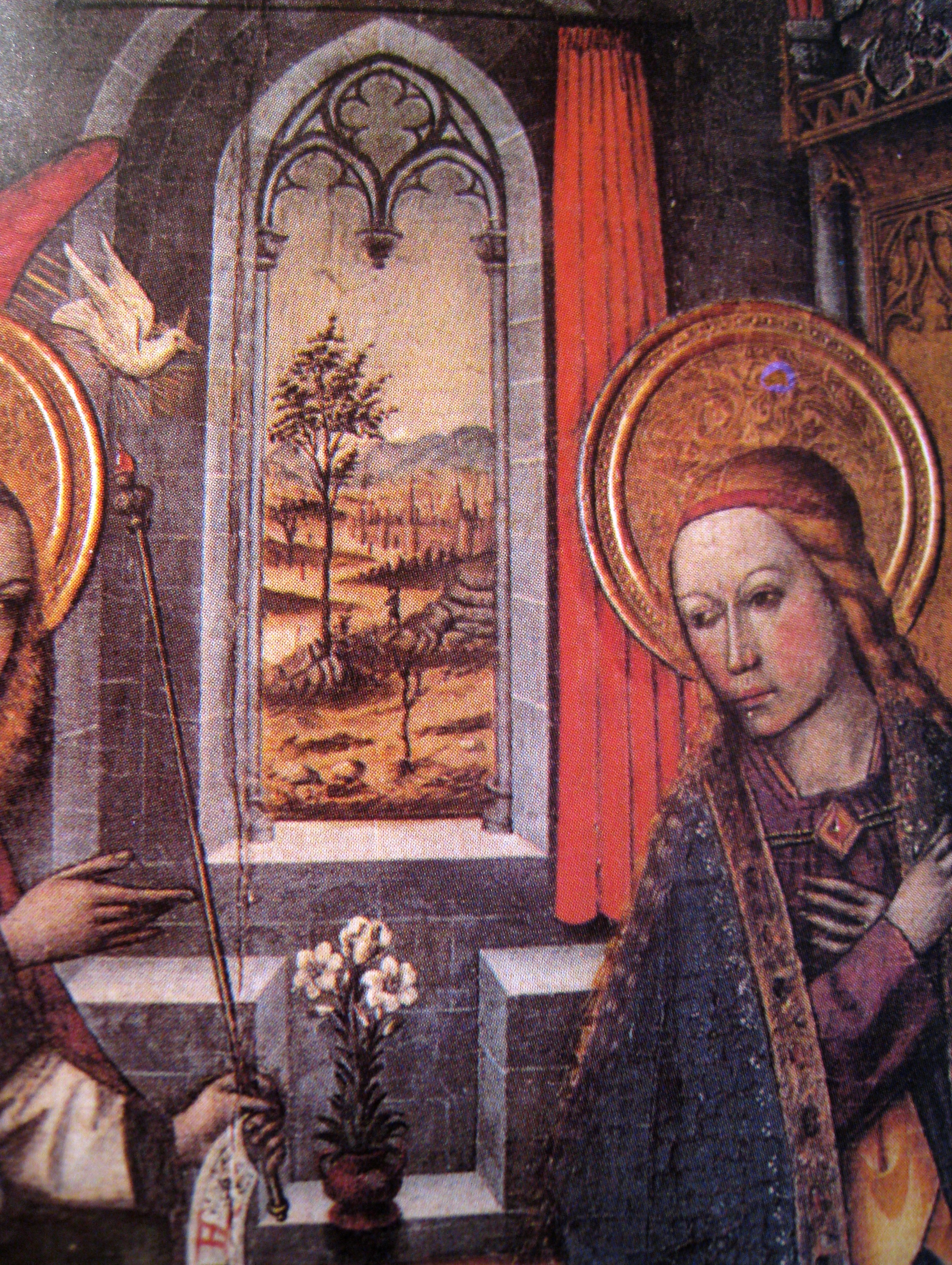 Detall de la finestra i el paisatge